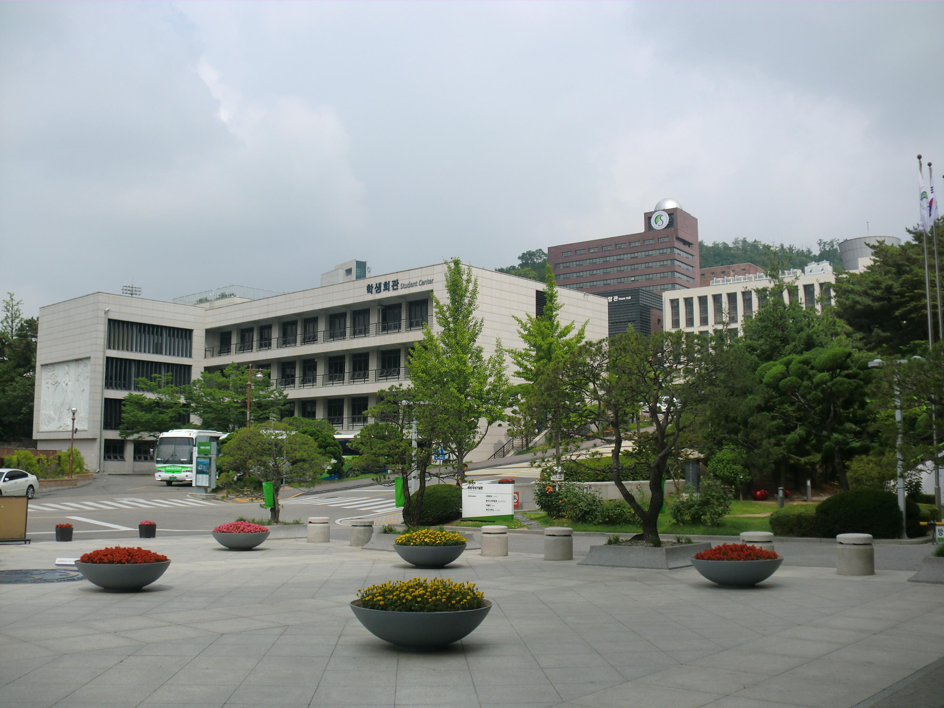 서울특별시 종로구에 있는 성균관대학교 학생회관